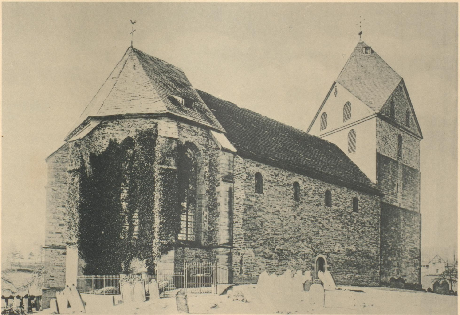 Die Peterskirche in Hohensyburg im Jahre 1890 von der Nord-Ostseite aus gesehen.